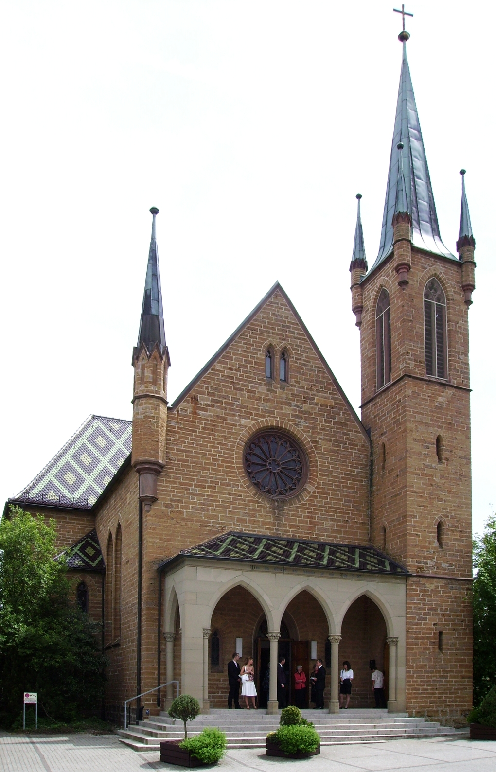 Hechingen